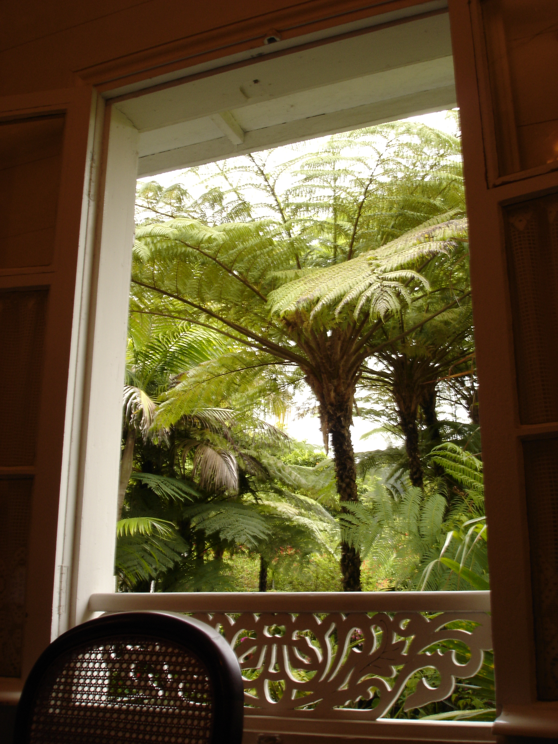 Description: Fougère arborescente dans la cour de la villa Folio, novembre 2004, La Réunion Source: Bouba